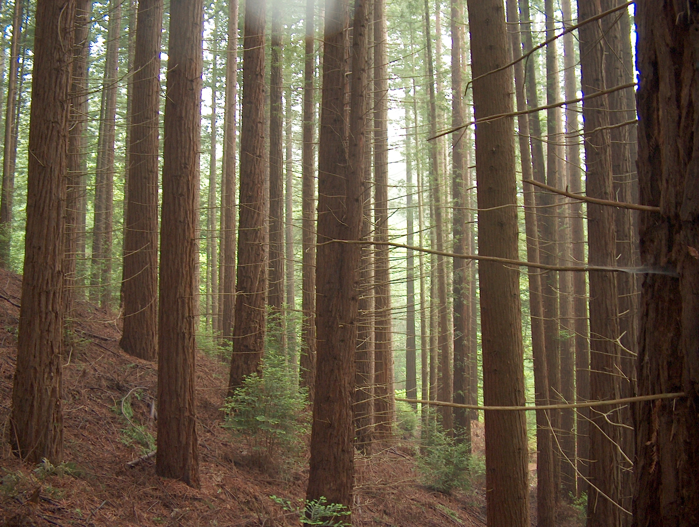 Sequoia sempervirens plantation, Monte Corona, CANTABRIA